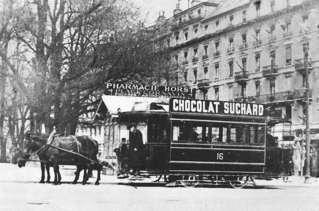 Voiture 16 devant la gare Cornavin vers 1880